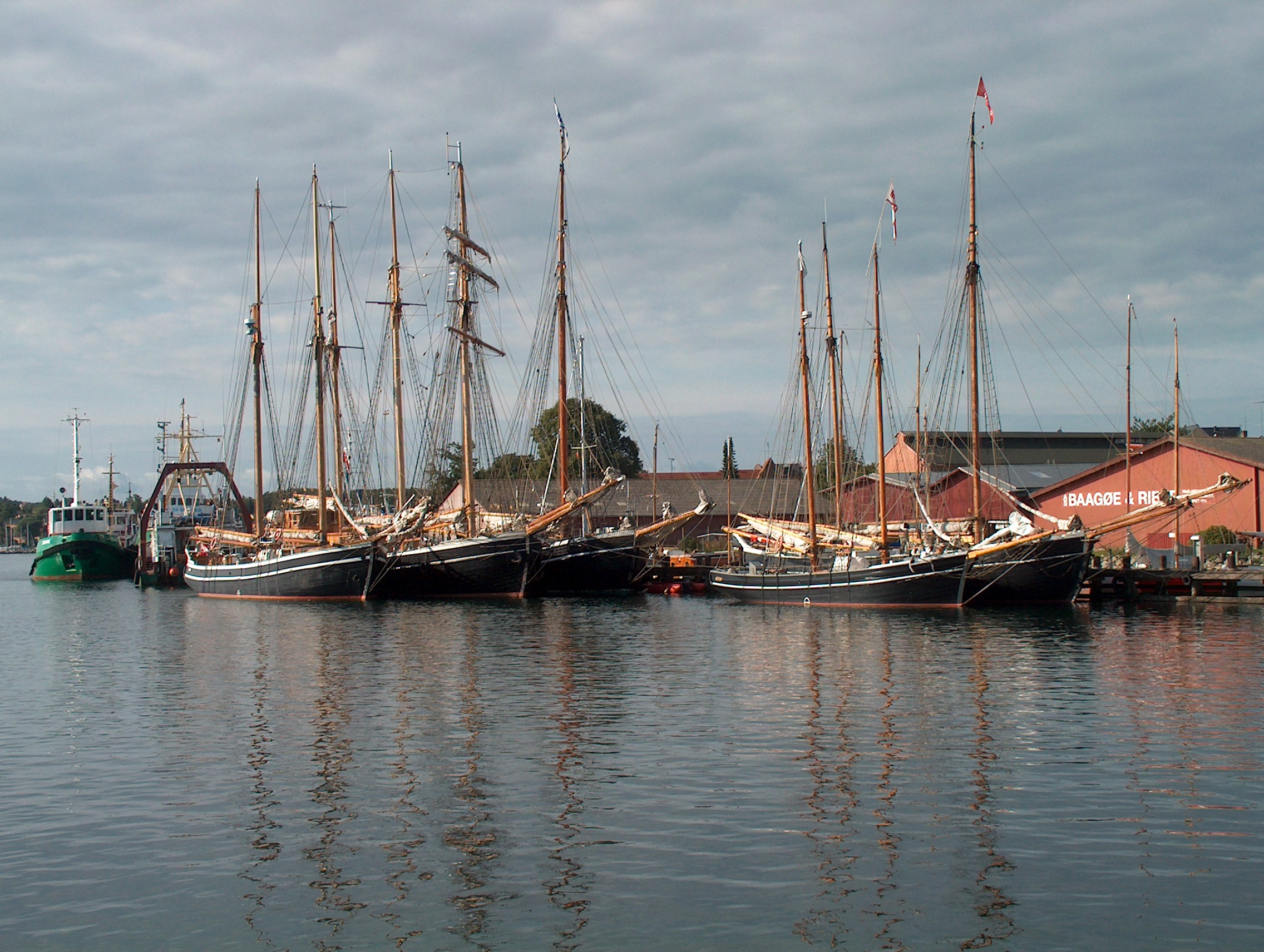 Hafen von Svendborg_Dänemark